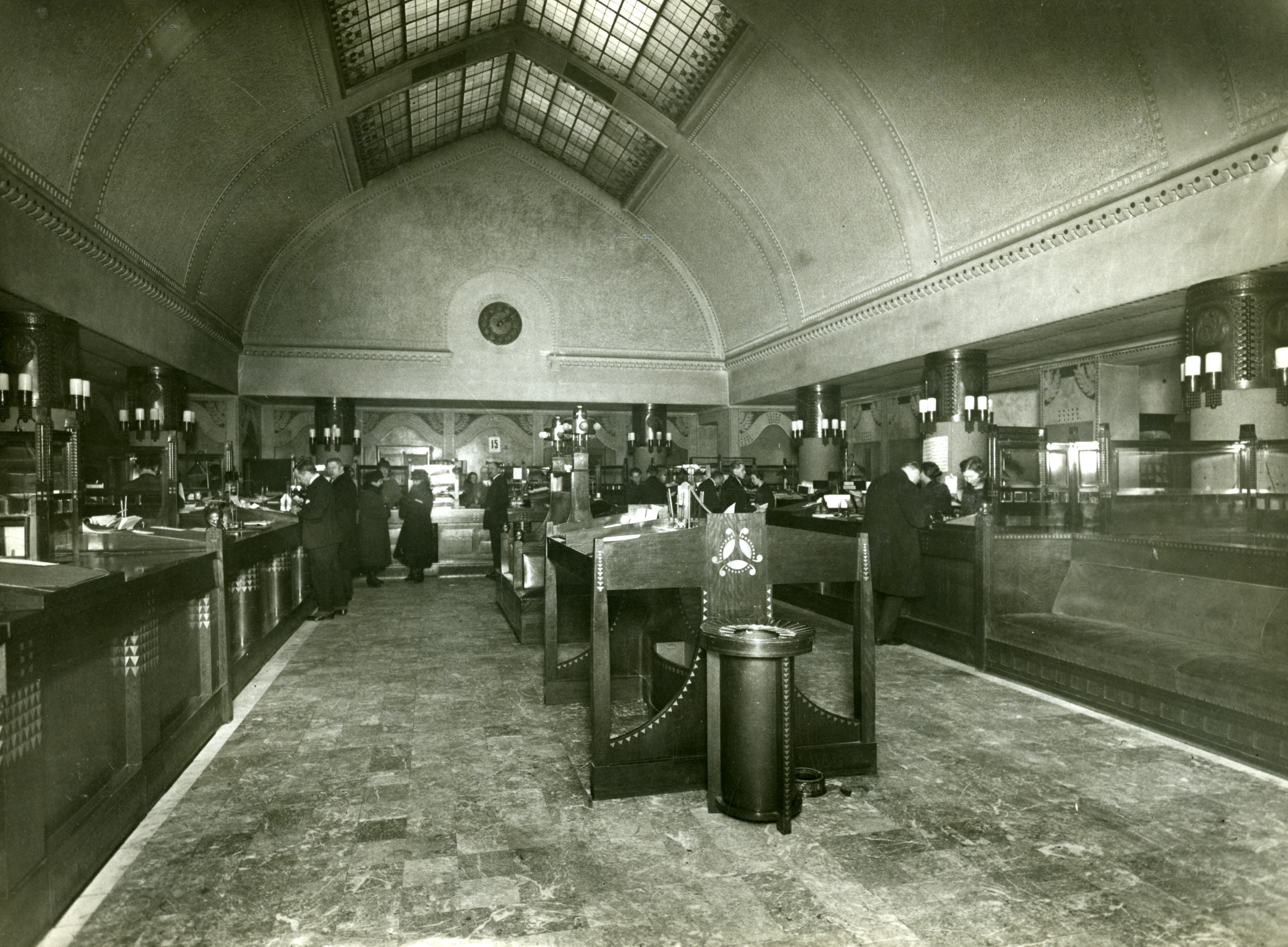 Kuvassa on Pohjoismaiden Osakepankin Helsigin sivukonttorin interiööri. Konttorin suunnittelivat Herman Gesselius, Armas Lindgren ja Eliel Saarinen. Konttori valmistui vuonna 1904, mutta se purettiin jo 30 vuotta myöhemmin.